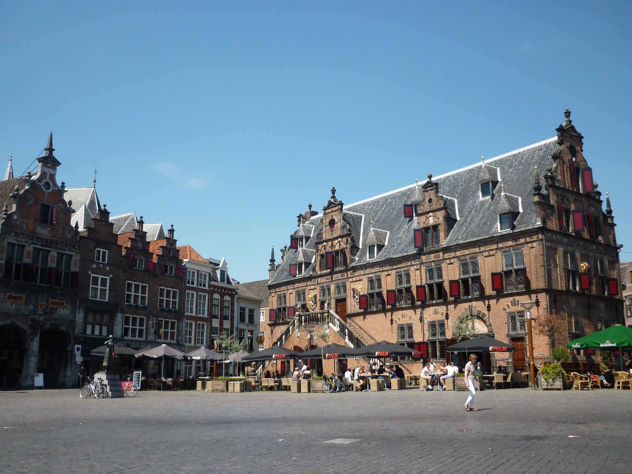 Zicht op een deel van het voormalige waaggebouw, Grote Markt 26, 6511 KB Nijmegen. Gelegen op de Grote Markt in het centrum van Nijmegen. Tegenwoordig is er de horeca-gelegenheid De Waagh in gevestigd